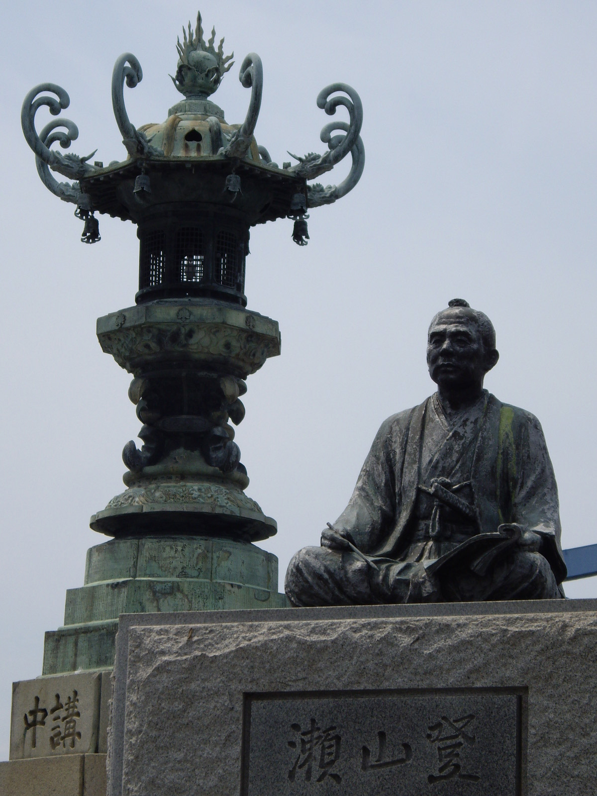 瀬山登 銅像と金毘羅講燈篭 - 日本国香川県丸亀市